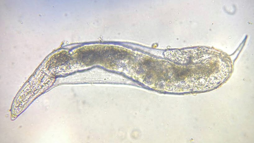 Meloidogyne sp. J3 larve